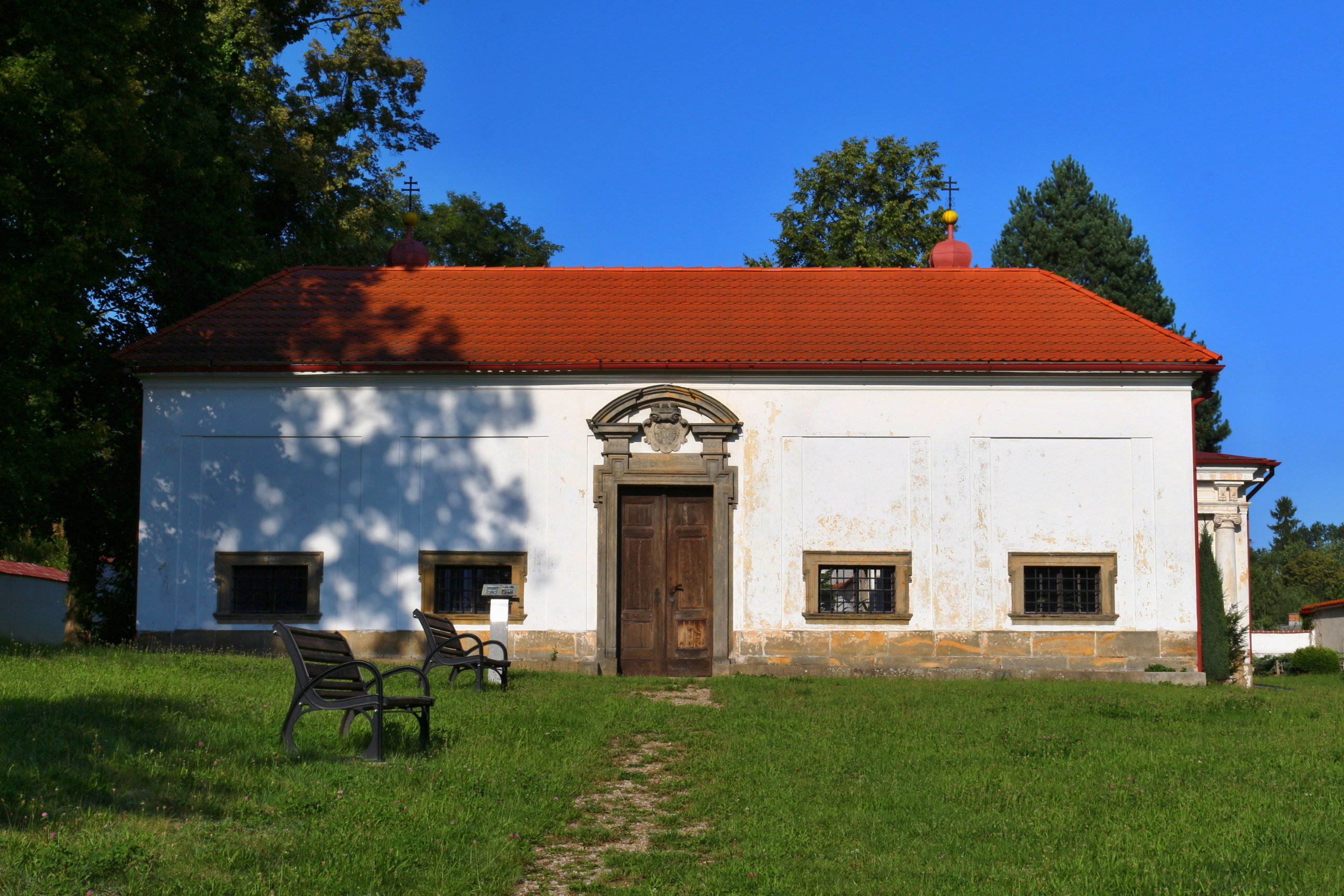 Areál kaple Božího hrobu v Mimoni